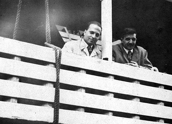 Jorge Sahade y Carlos Cesco parten en 1943, a bordo del barco "Río Atuel" hacia los Estados Unidos para participar de una Beca.